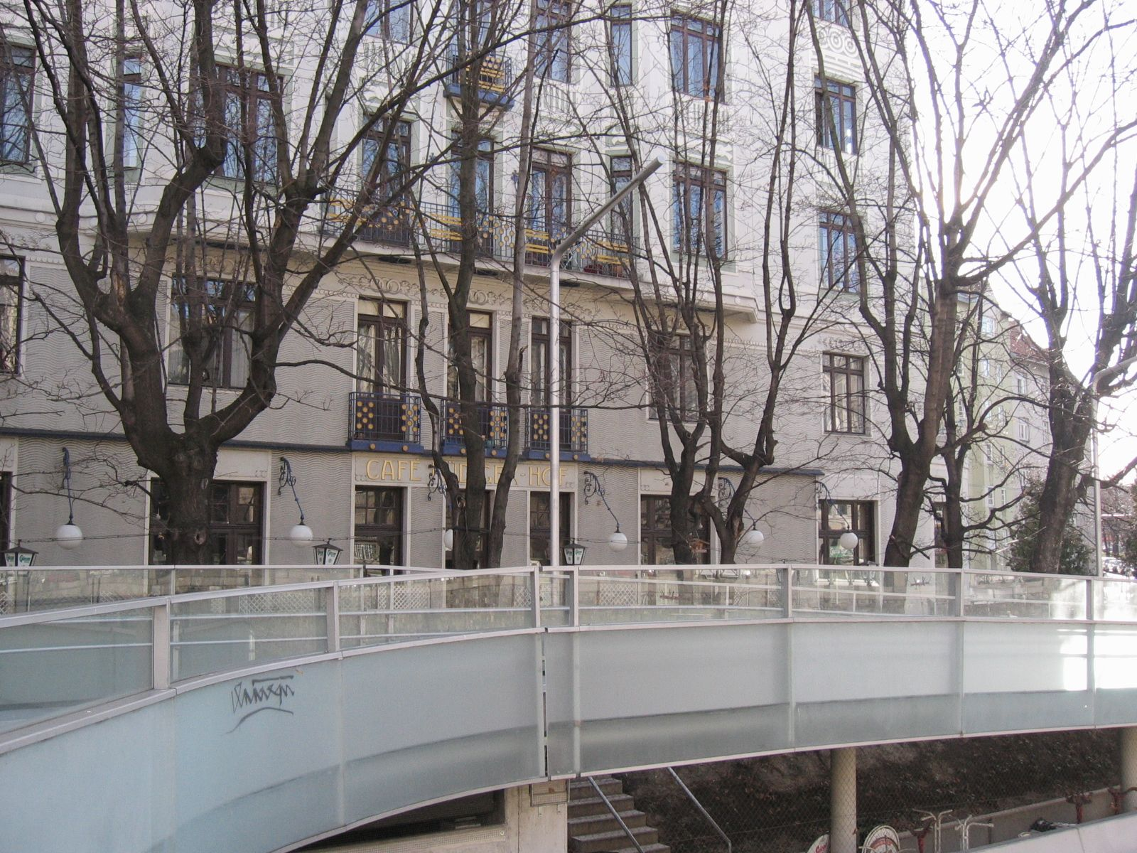 Cafe Rüdigerhof with Margeritensteg